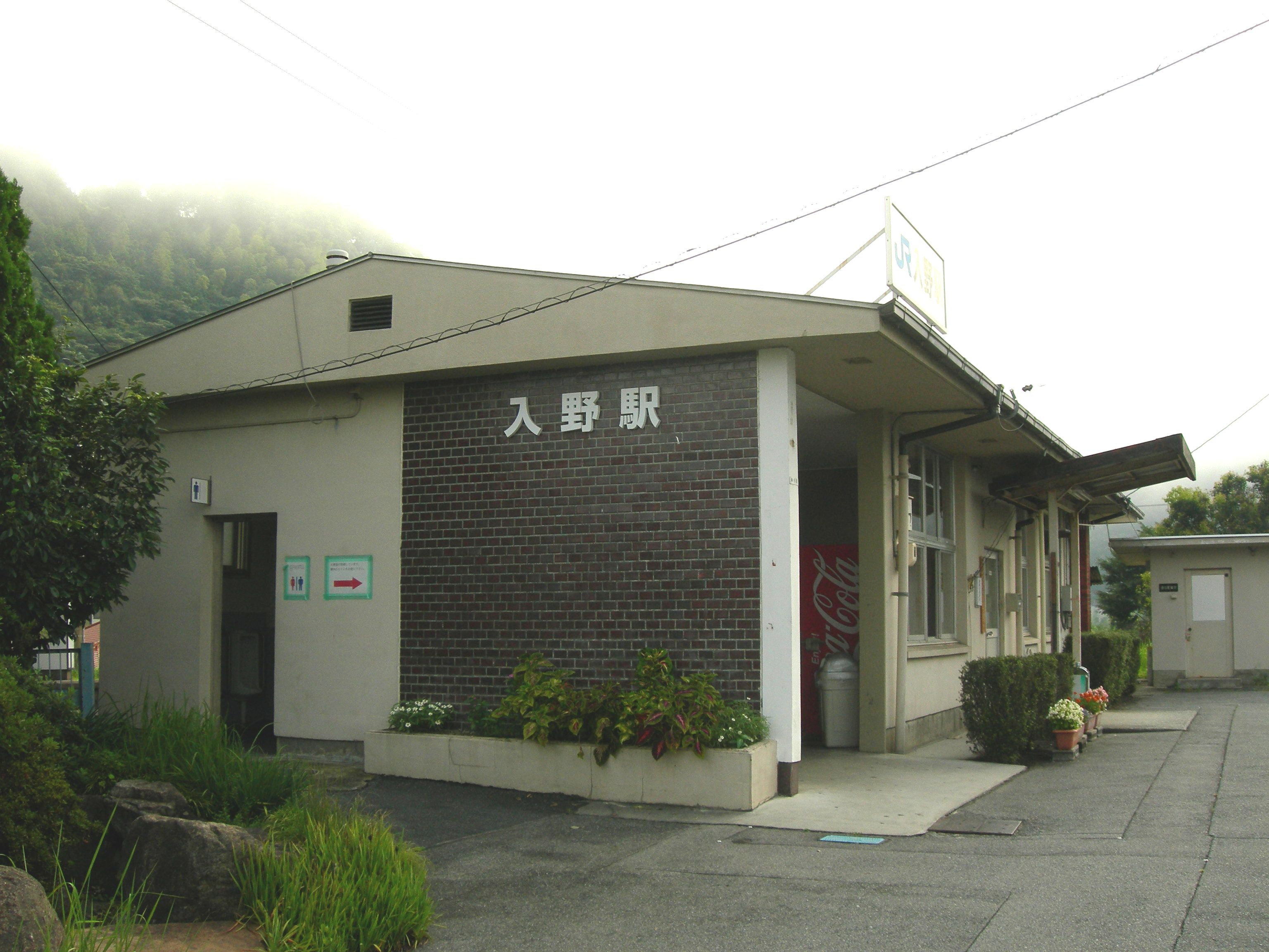 入野駅の駅舎外観